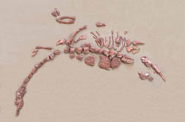 gerecsei őskrokodil